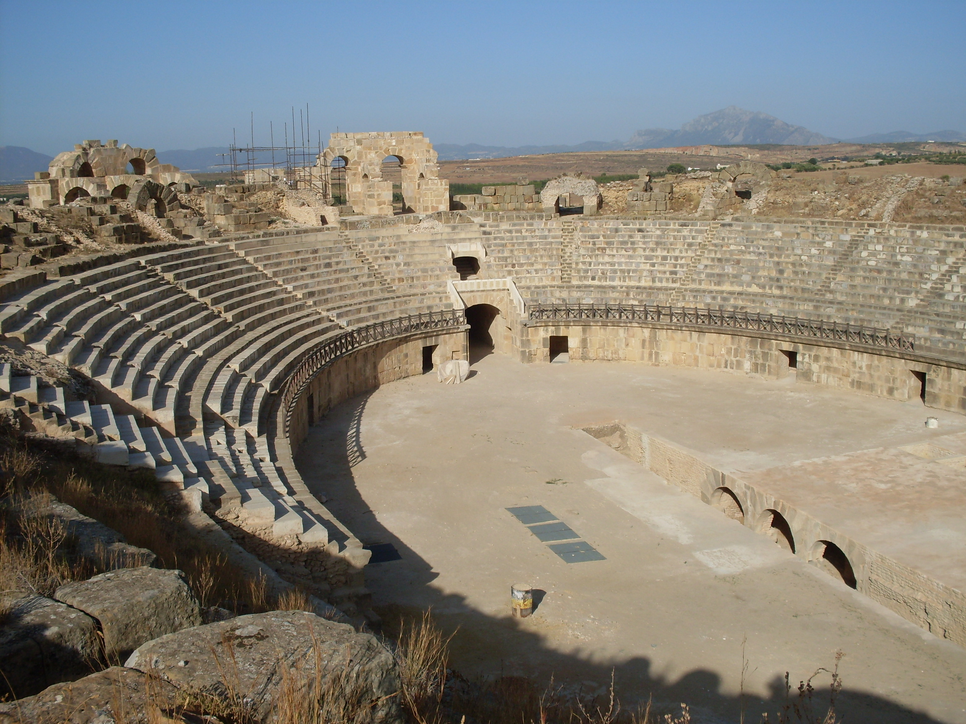 Amphitéatre d'Oudhna Uthina